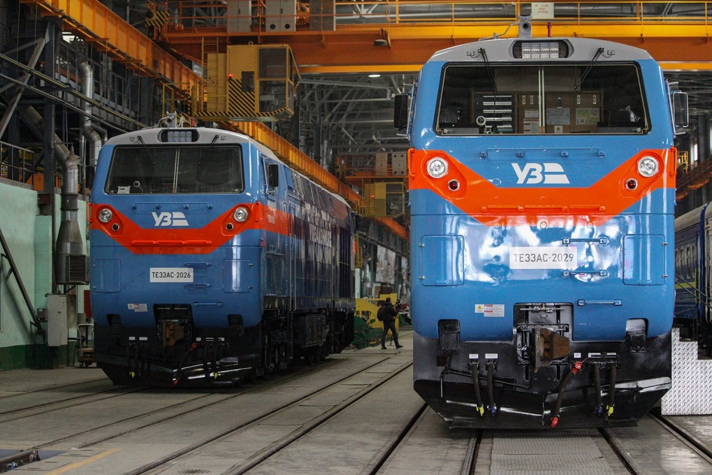 TE33A «Тризуб» компанії "Укрзалізниця"